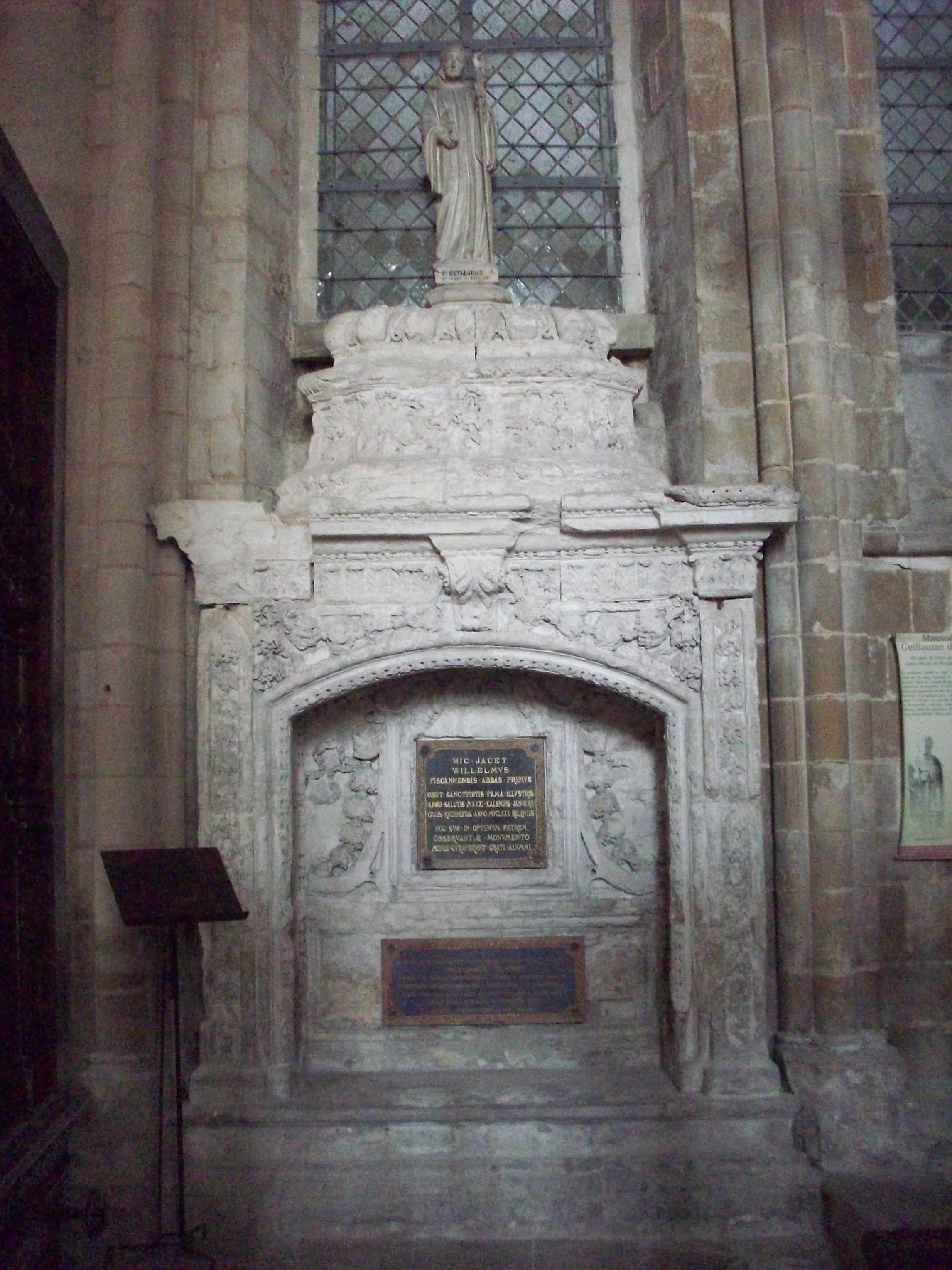 Tombeau de Guillaume de Volpiano.